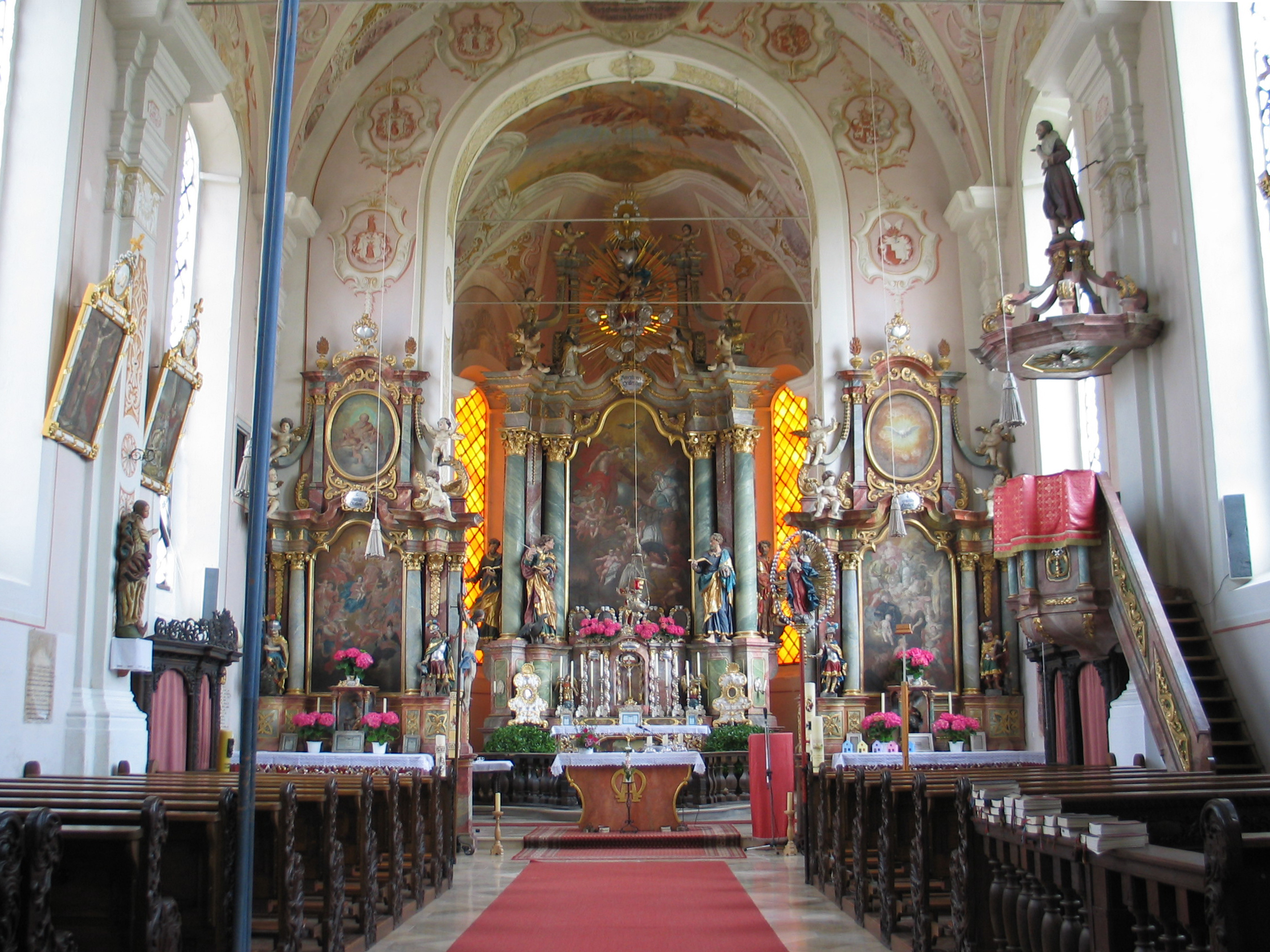 Thürnthenning, Kath. Filialkirche St. Johannes Nepomuk. Inneres gegen Osten.